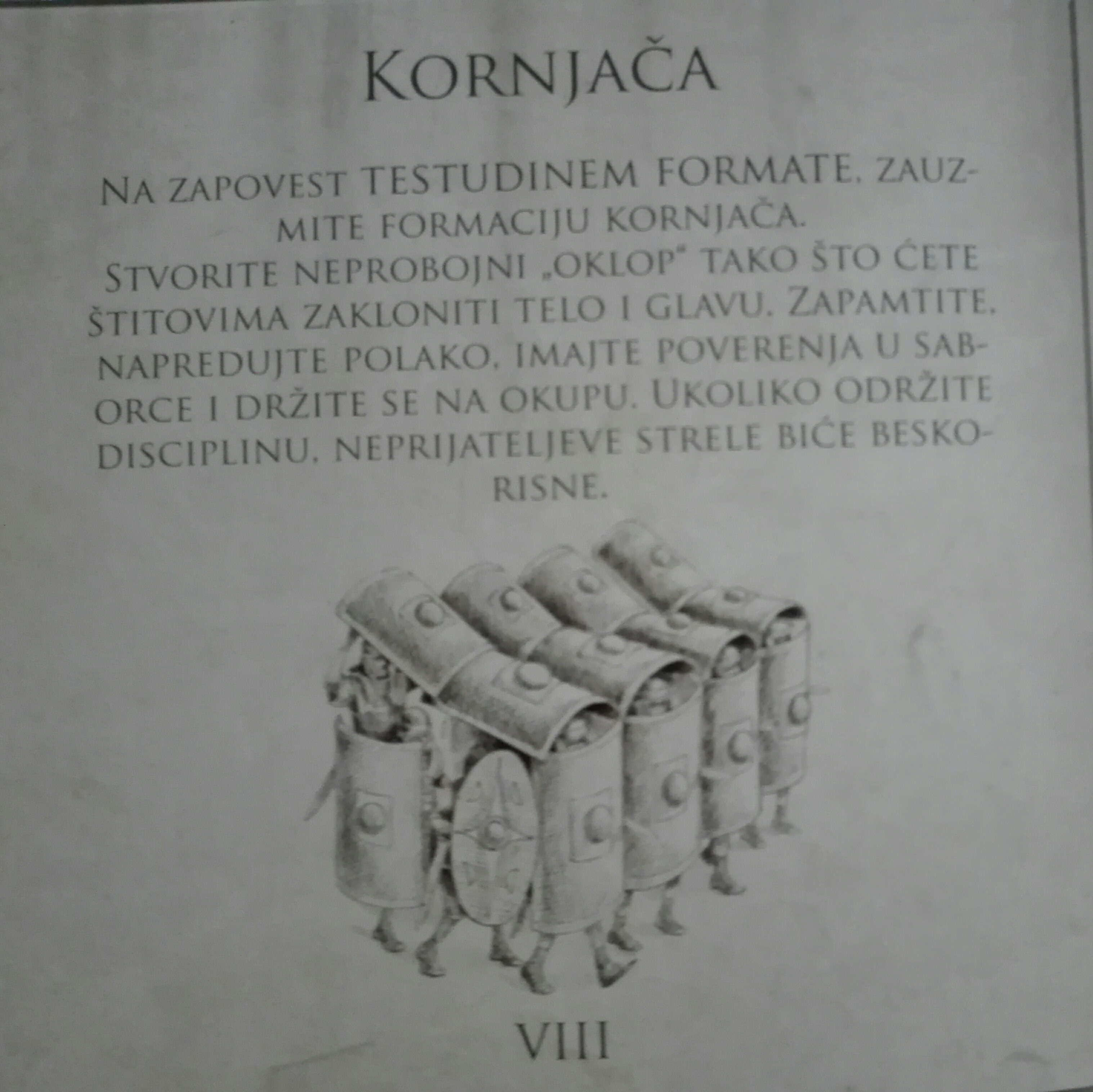 Формација корњаче